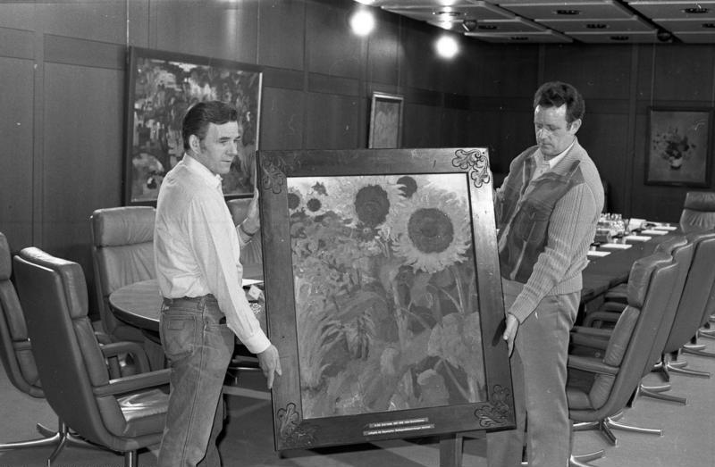 Emil Noldes Bild "Hohe Sonnenblumen" wurde als Leihgabe der Bayerischen Staatsgemäldesammlungen Bundeskanzler Helmut Schmidt zur Verfügung gestellt (Aushang im Kabinettsaal).